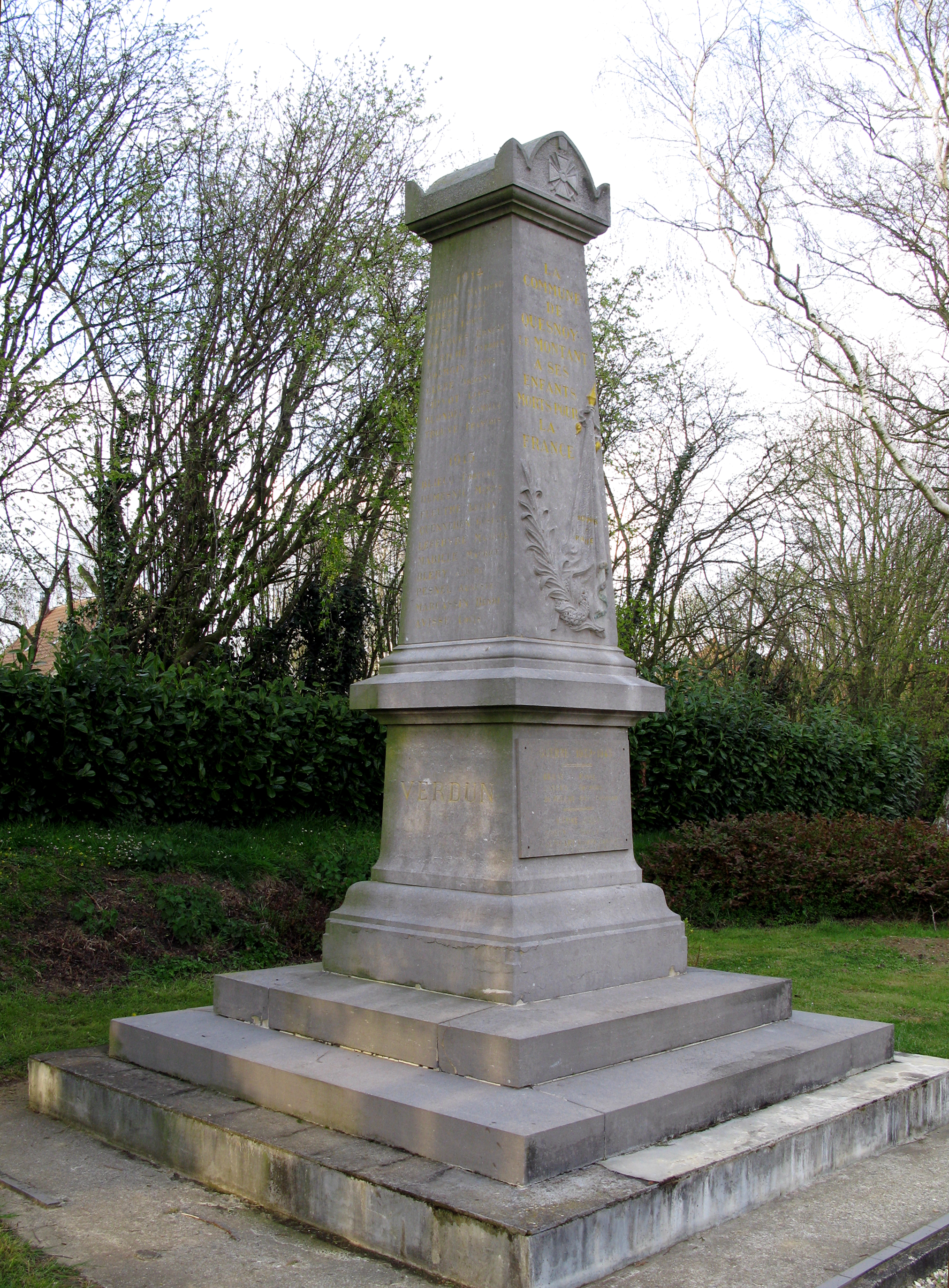 Quesnoy-le-Montant (Somme, France) - Le monument-aux-morts.